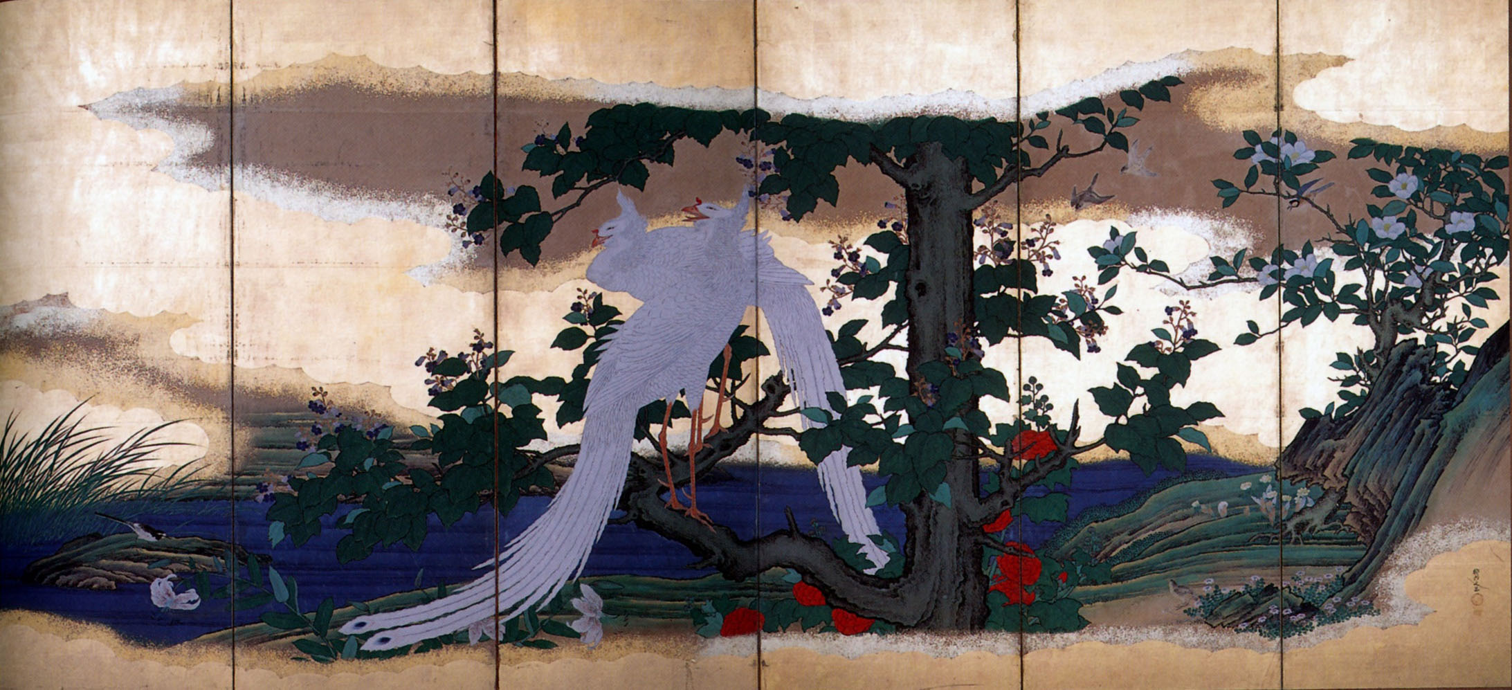 江戸後期に京都で活躍した狩野永岳による6曲一双の屏風絵「白鳳白雉図」のうち白鳳図。縦165.0センチ横356.4センチ 紙本著色 教王護国寺所蔵